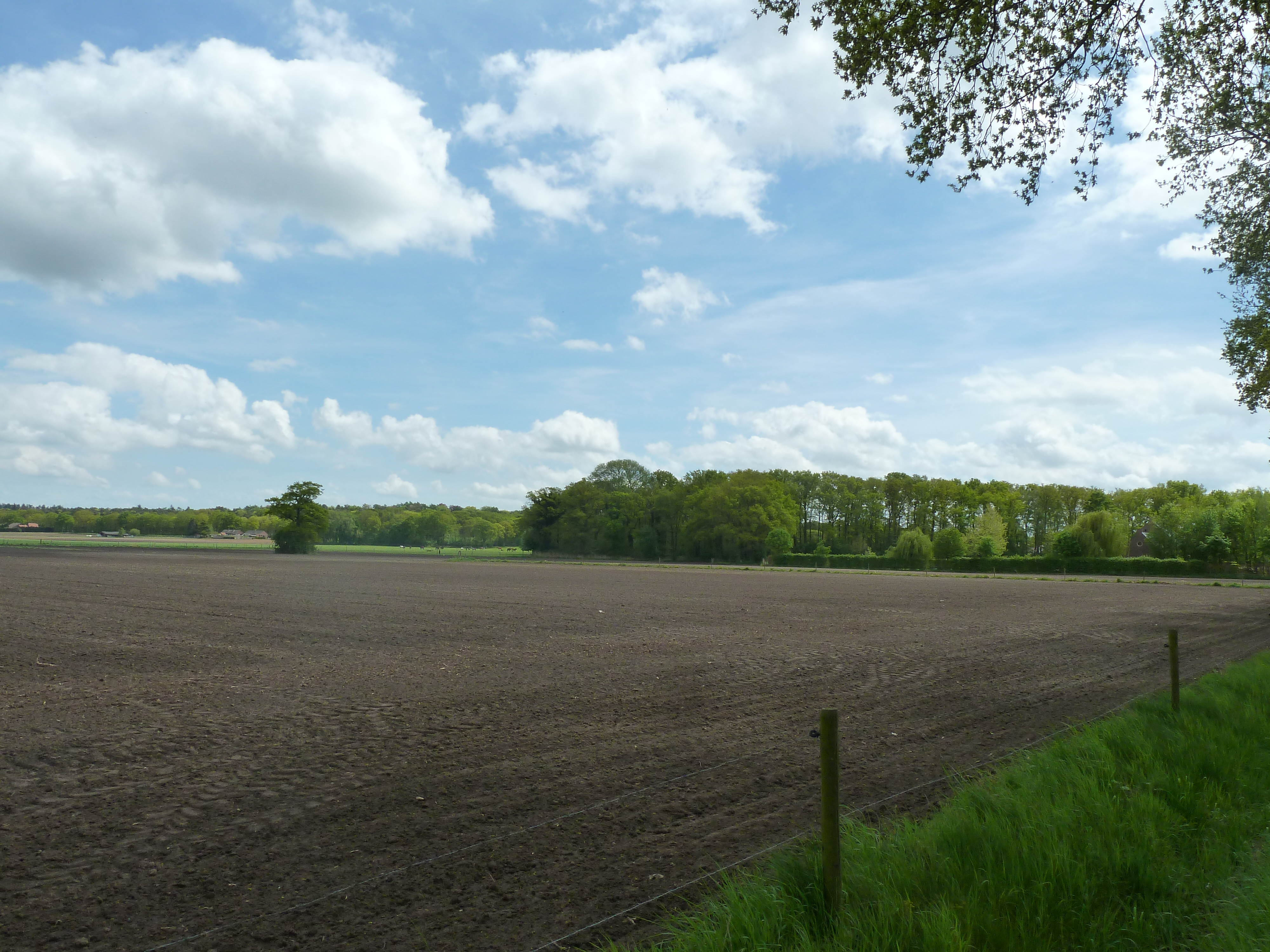 Motte Bolleberg bij Maria-Hoop, Limburg, Nederland